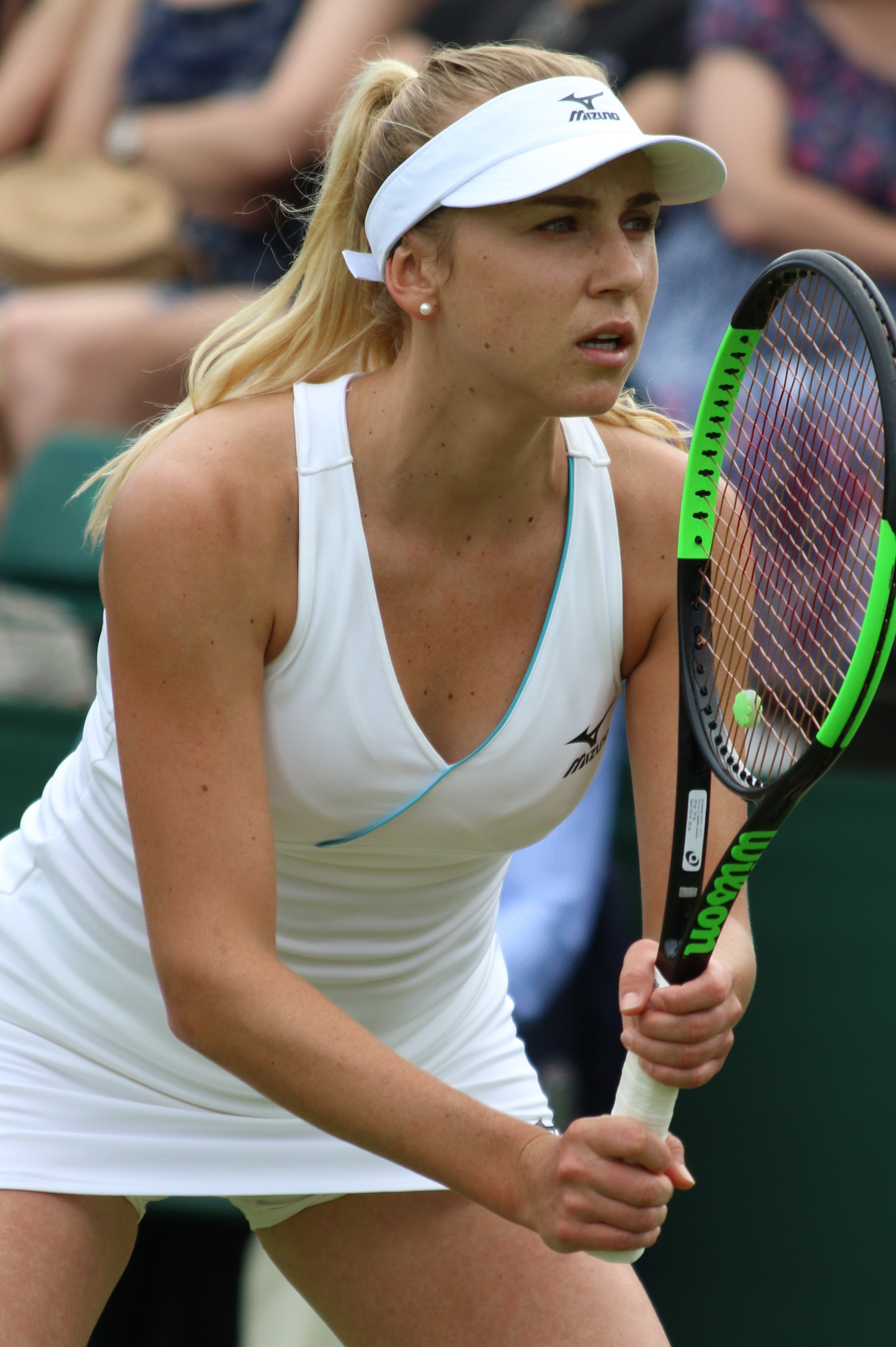 Kichenok N. WM19 (20)